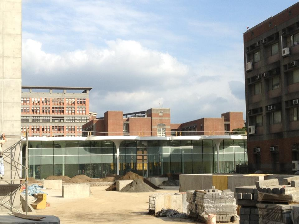 中文（台灣）: 國立臺灣大學社會科學院（總區）（興建中）